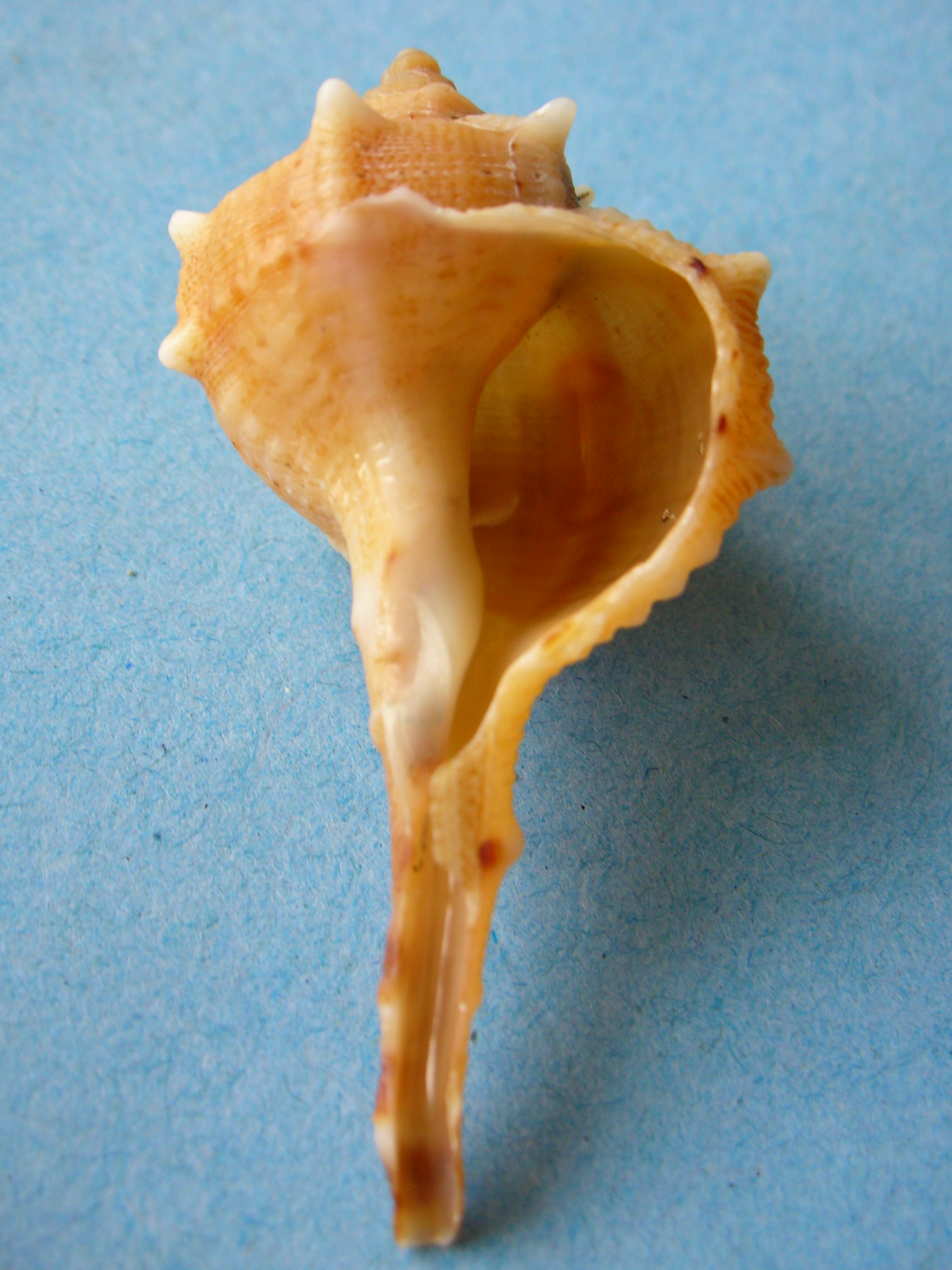 Haustellum brandaris, loc. Torregaveta, Bacoli (NA) Italy